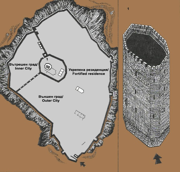 Plan du château de Cepina (Bulgarien)